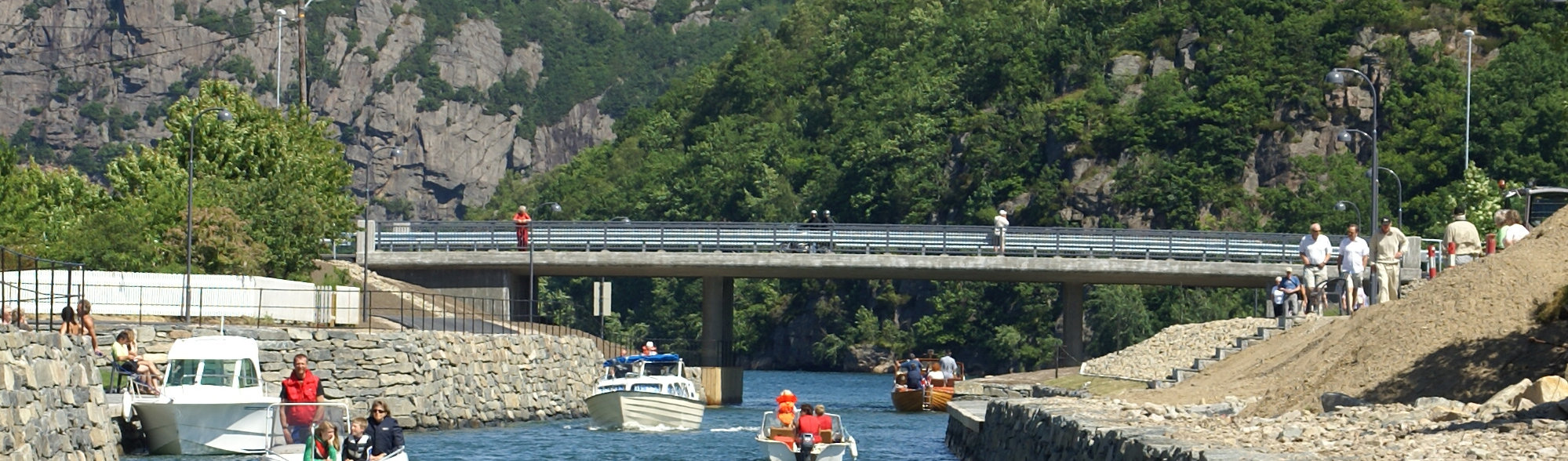 Nordligste bru over Spangereidkanalen